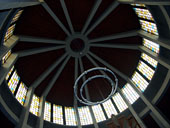 Blick von innen in die Kuppel der Essener Auferstehungskirche, Manteuffelstraße 26, mit Kirchenfenstern von Johan Thorn Prikker